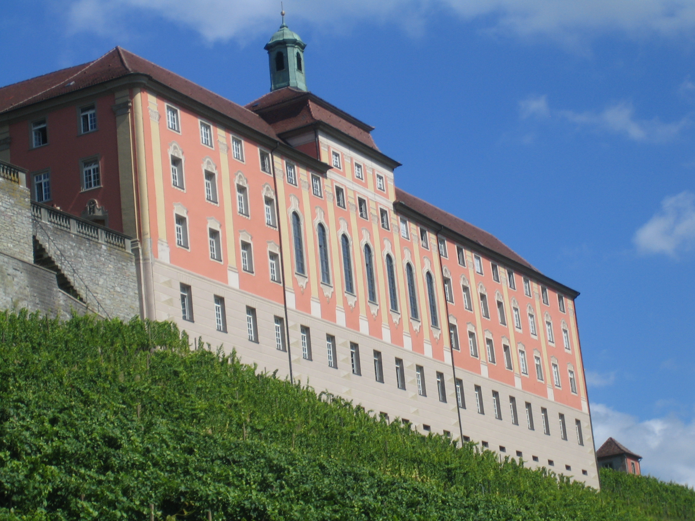 Droste-Hülshoff-Gymnasium (Meersburg) Das Gebäude des Priesterseminars, das oberhalb der Reblage Rieschen und über dem Hafen thront, wurde immer für Ausbildungszwecke genutzt: von 1735 bis 1825 zur Ausbildung katholischer Priester, dann als katholisches Lehrerseminar, Aufbaurealschule (1925–1937), Reichsfinanzschule (1937–1945), Pädagogium für angehende Volksschullehrer (1946–1953) und als Aufbaugymnasium (seit 1952). Die Schule heißt heute Droste-Hülshoff-Gymnasium. Durch diese Zweckbestimmungen war die im Priesterseminar gelegene Barockkapelle mit Deckenfresken für die Öffentlichkeit nie zugänglich. Koordinaten: 47.692591 N ,9.274803 O